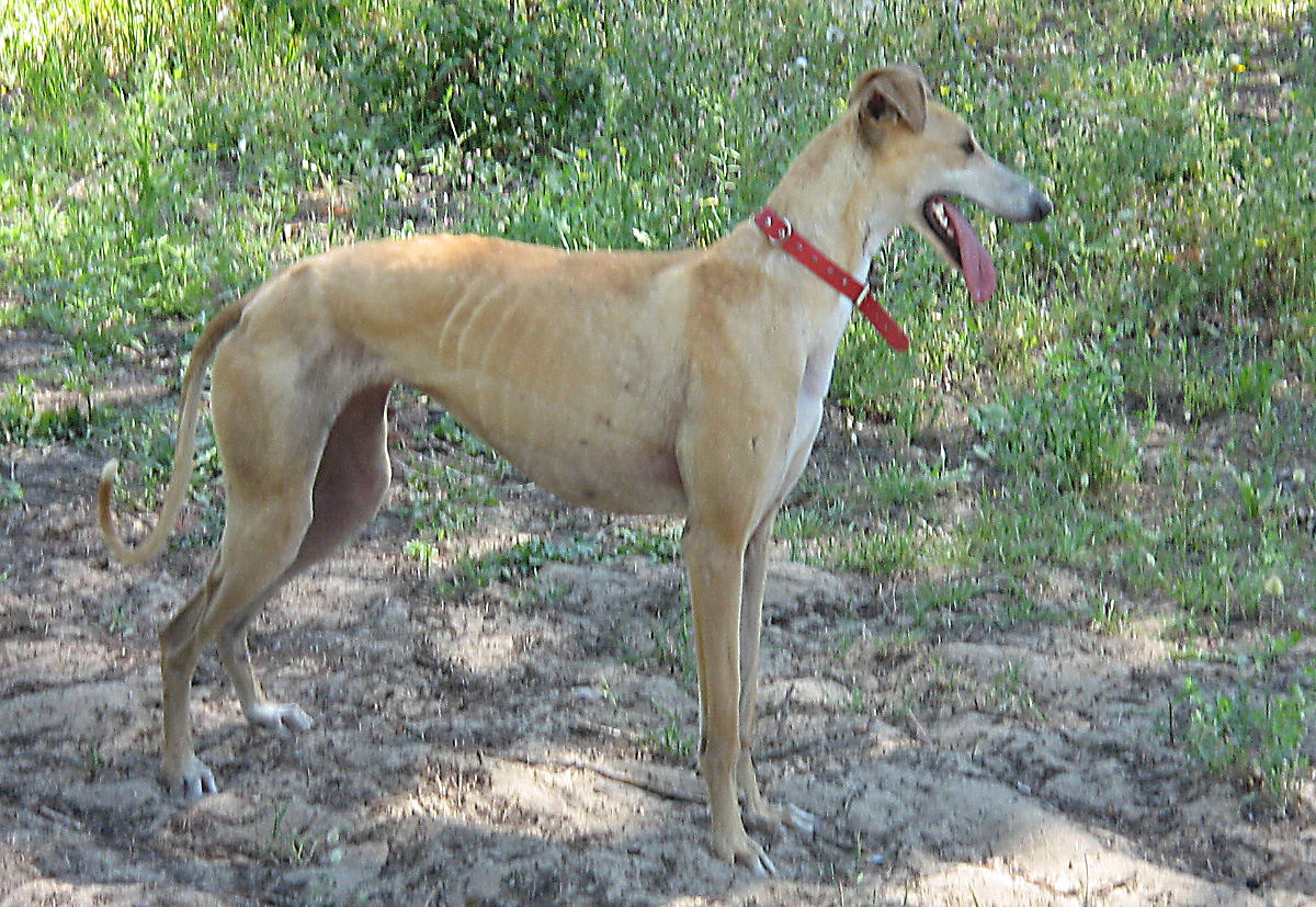 Galgo Español hembra/female